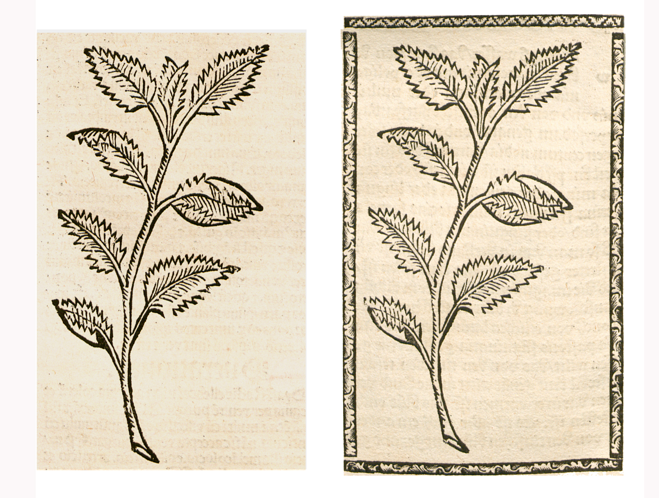 Abbildung von: Wild Salbei (Salvia pratensis)